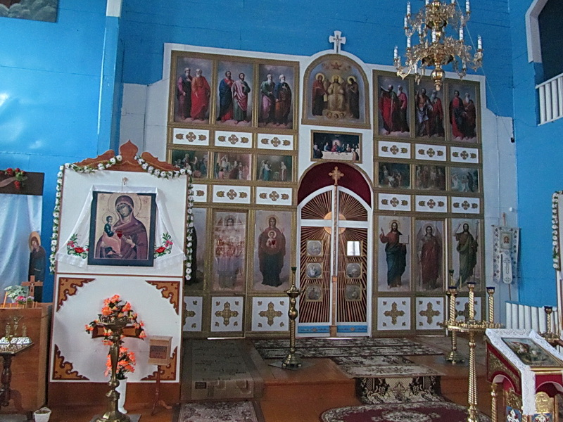 Залужжа. Царква Святога Георгія